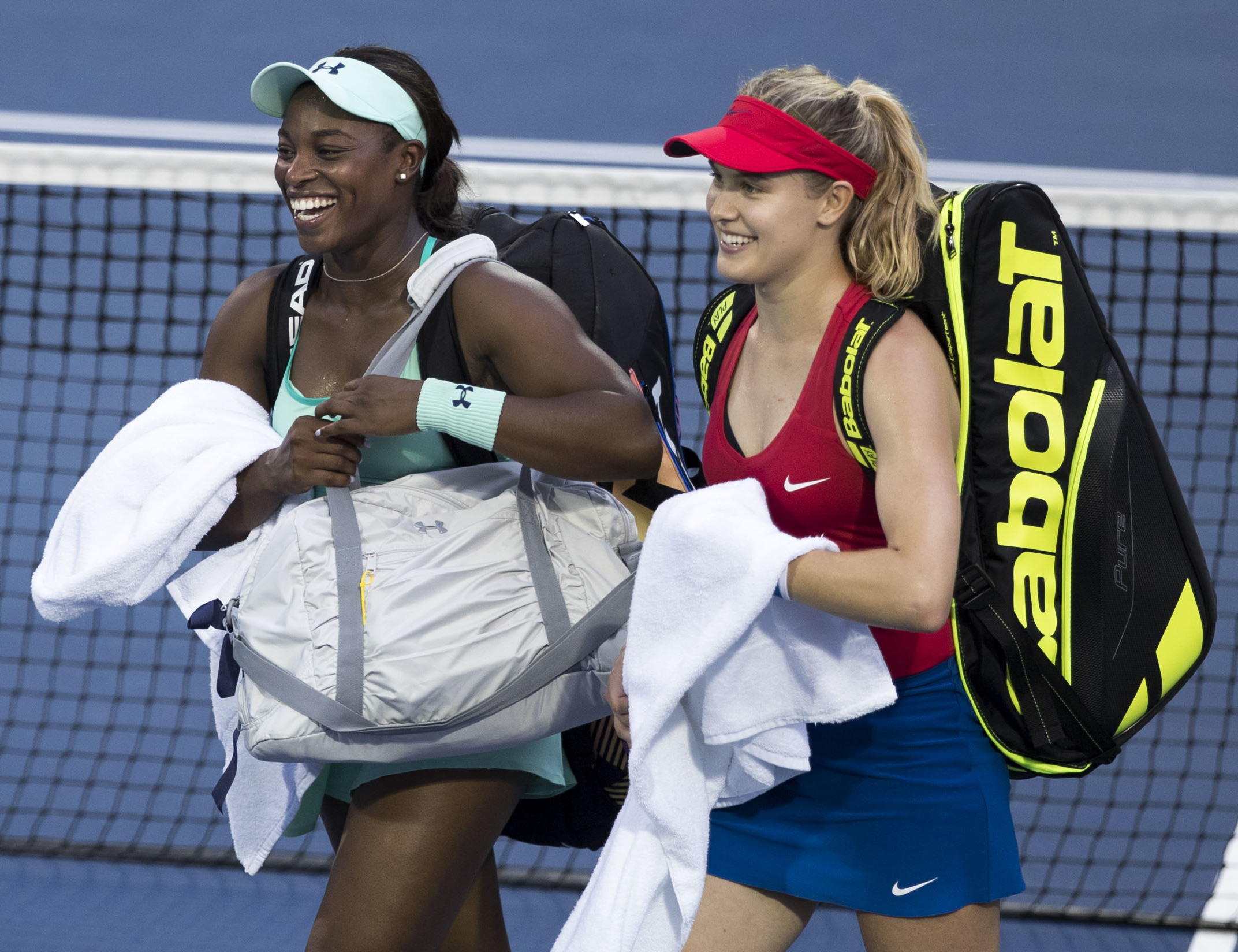 Citi Open Tennis 2017